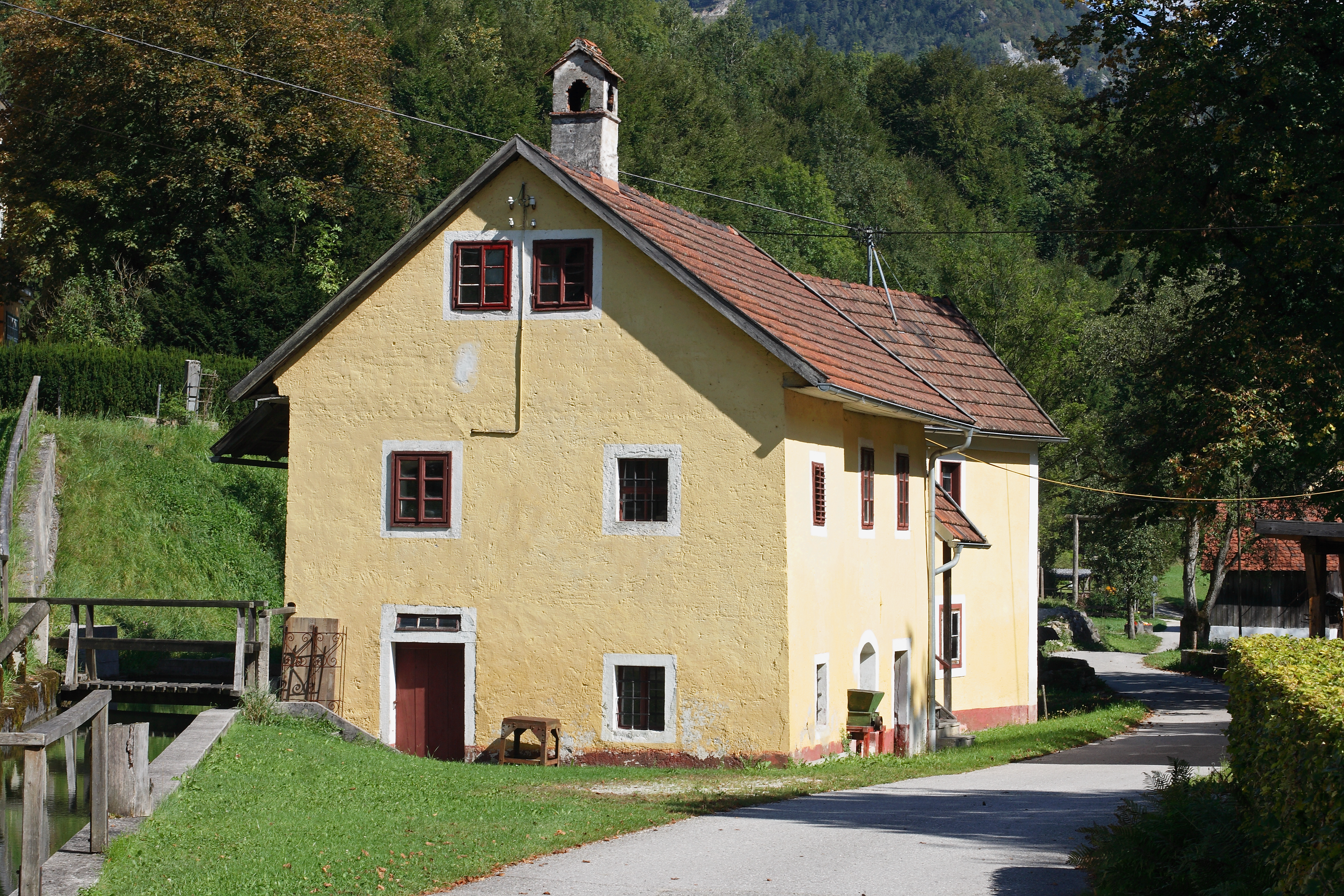 Das Mühlhäusl (Mühlenhäuschen) im Freilichtmuseum Schmiedleithen